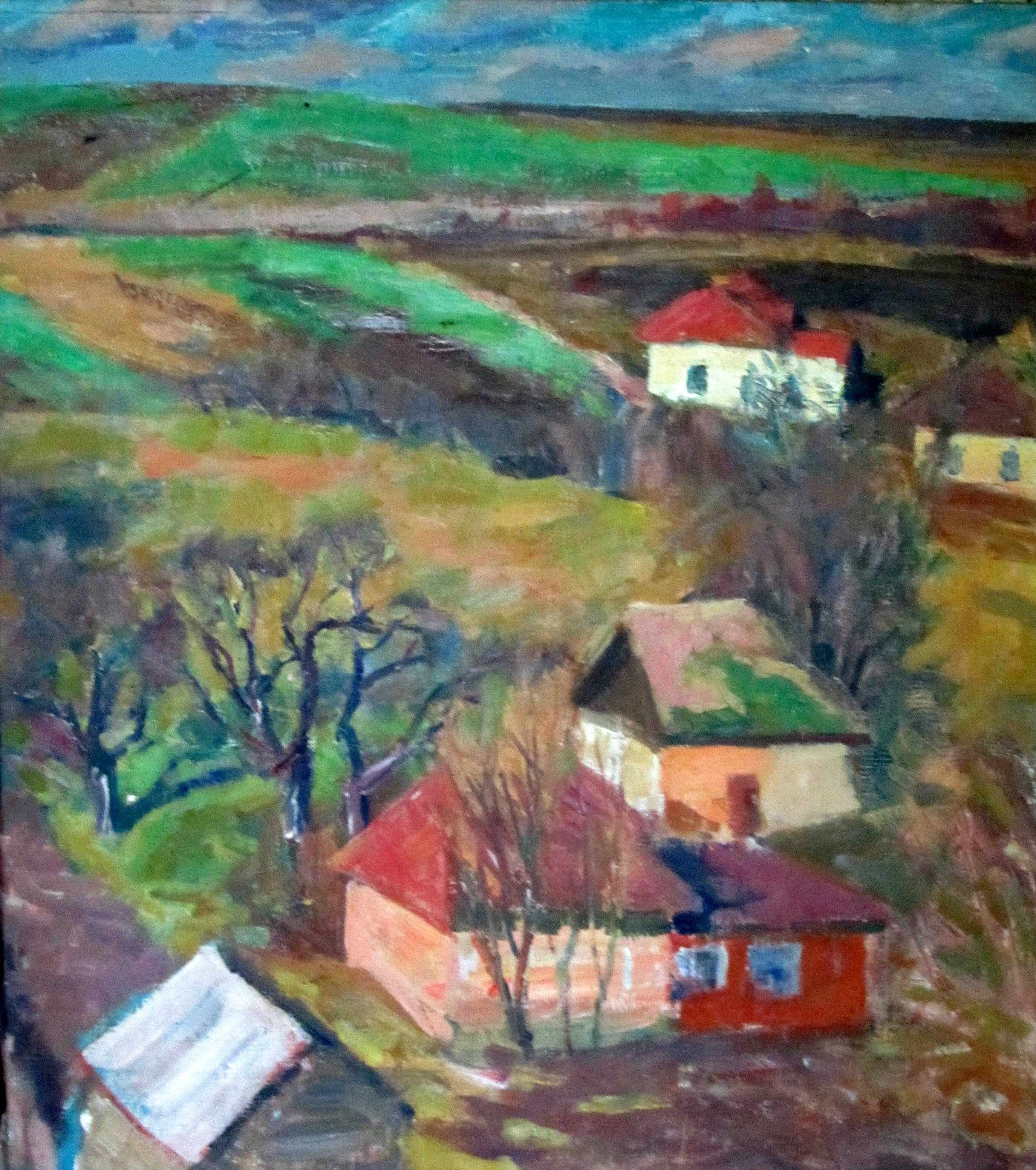 Пейзаж українського художника Г.І. Бельцова "Українські хатки". Створено у 60-і роки.